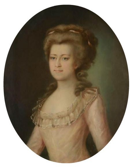 Портрет неизвестной. Графиня Анна Николаевна Салтыкова, ур. Леонтьева (1776—1810).